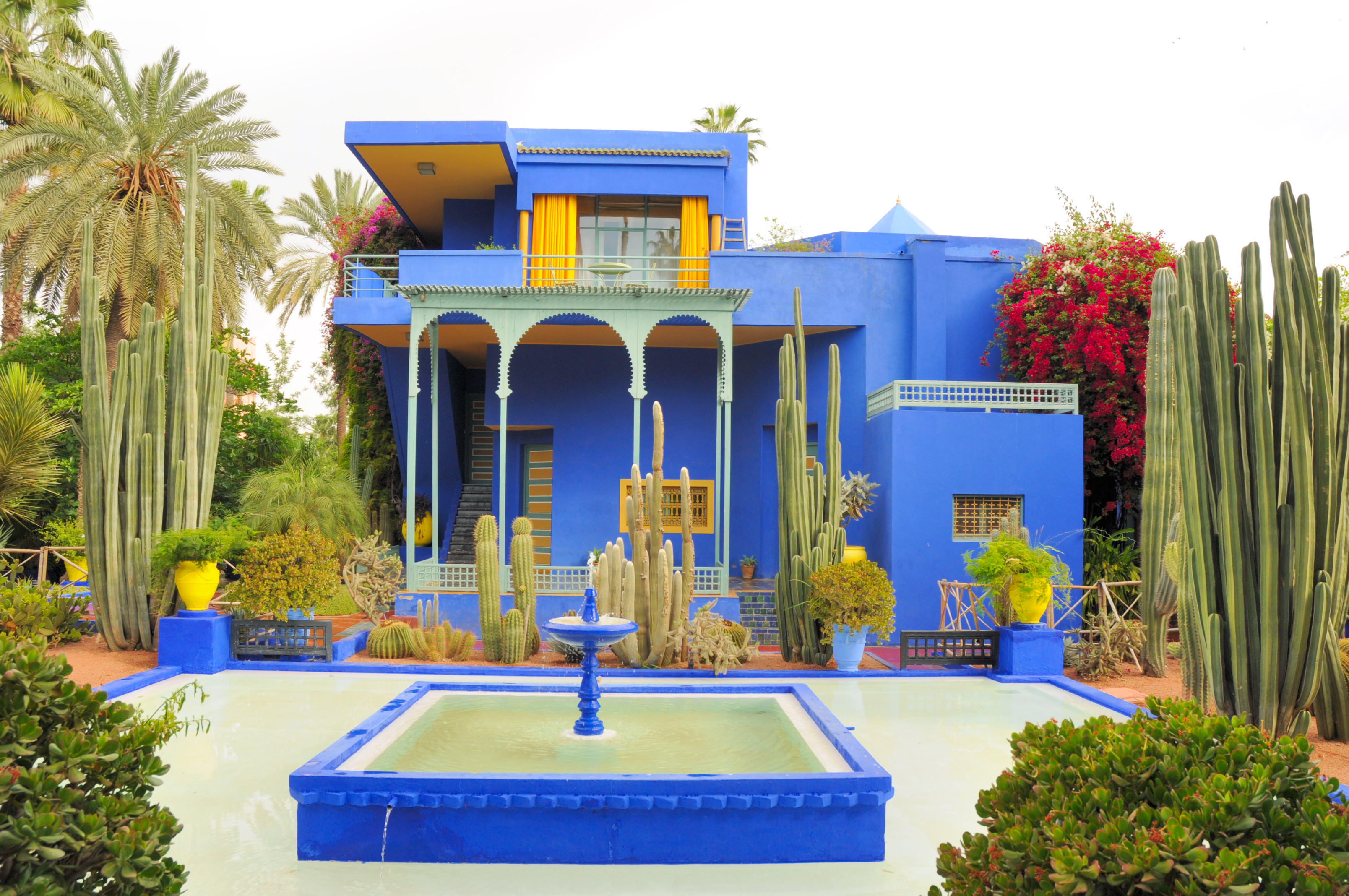 \Jardin_des_majorel\Le jardin des majorelle l5.JPG Marrakech Maroc